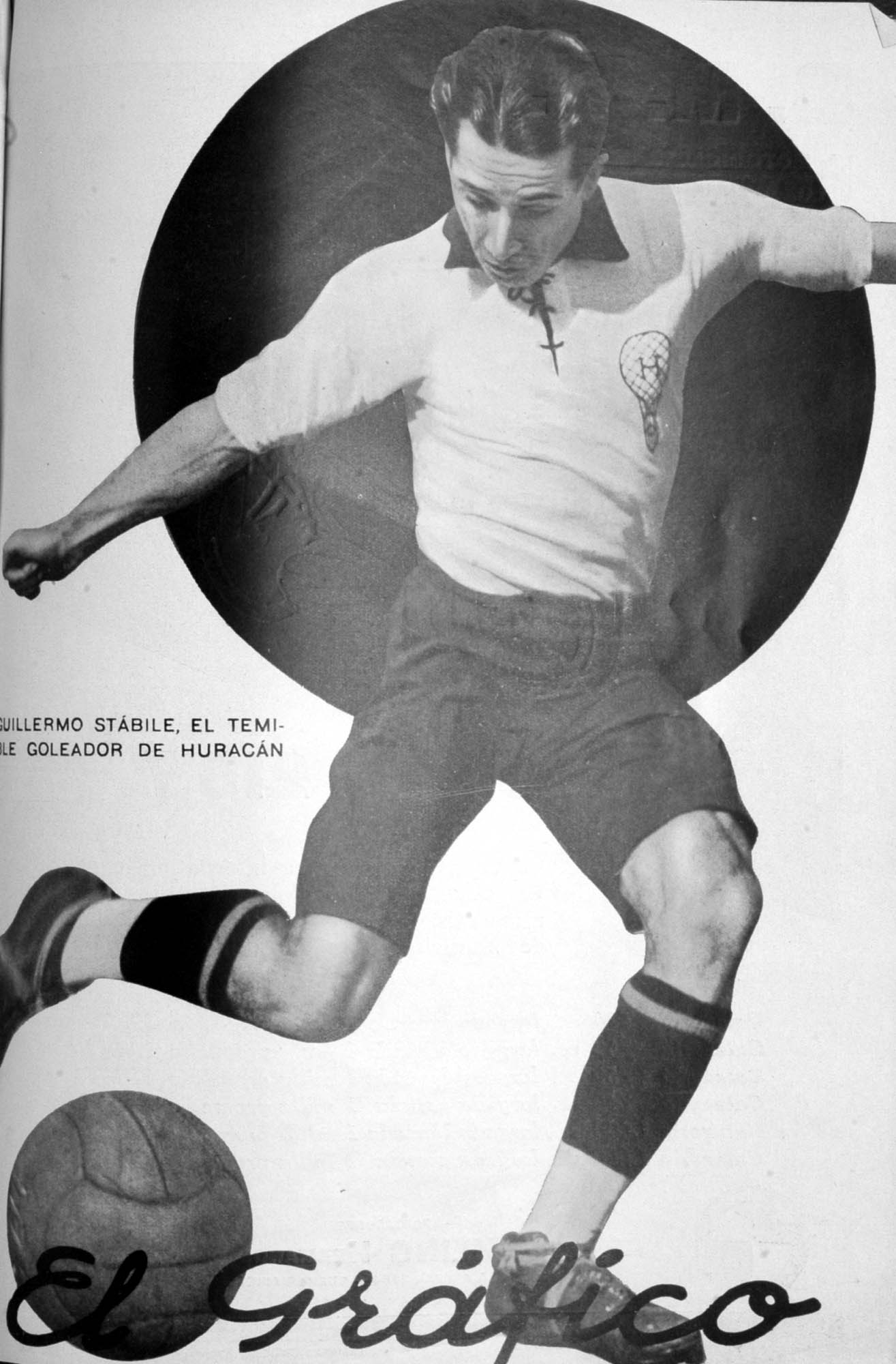 El Grafico del 19 de Abril de 1930. Edicion 562